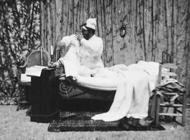 Méliès, Une nuit terrible (Star Film 26, 1896)